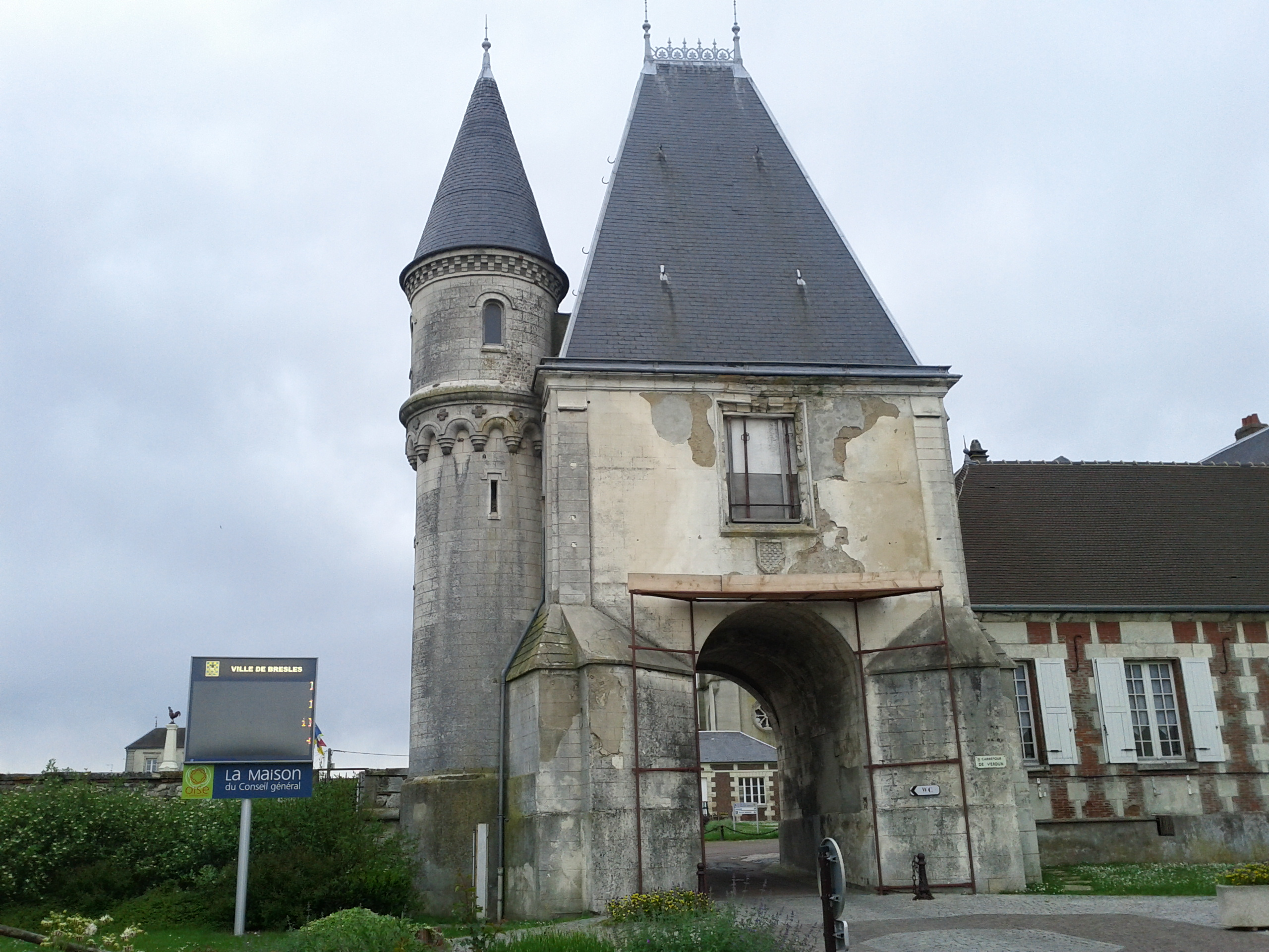 60510 Bresles, France